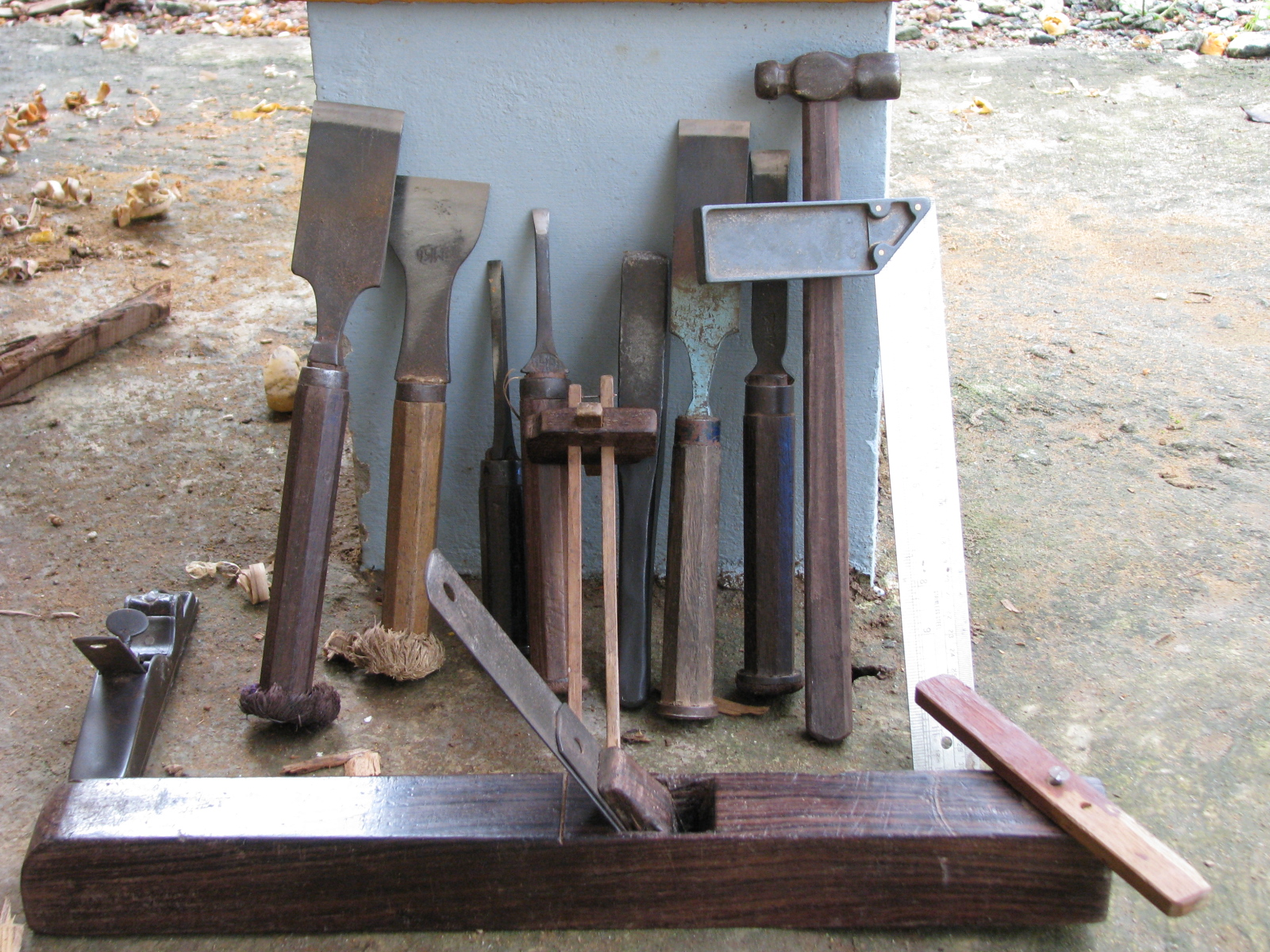 ആശാരിമാരുടെ പണിയായുധങ്ങൾ